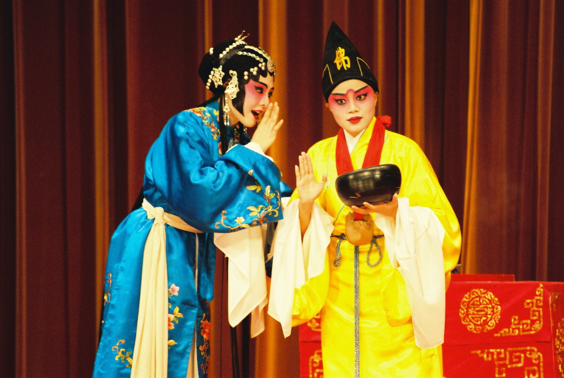 театър в Тайпей.